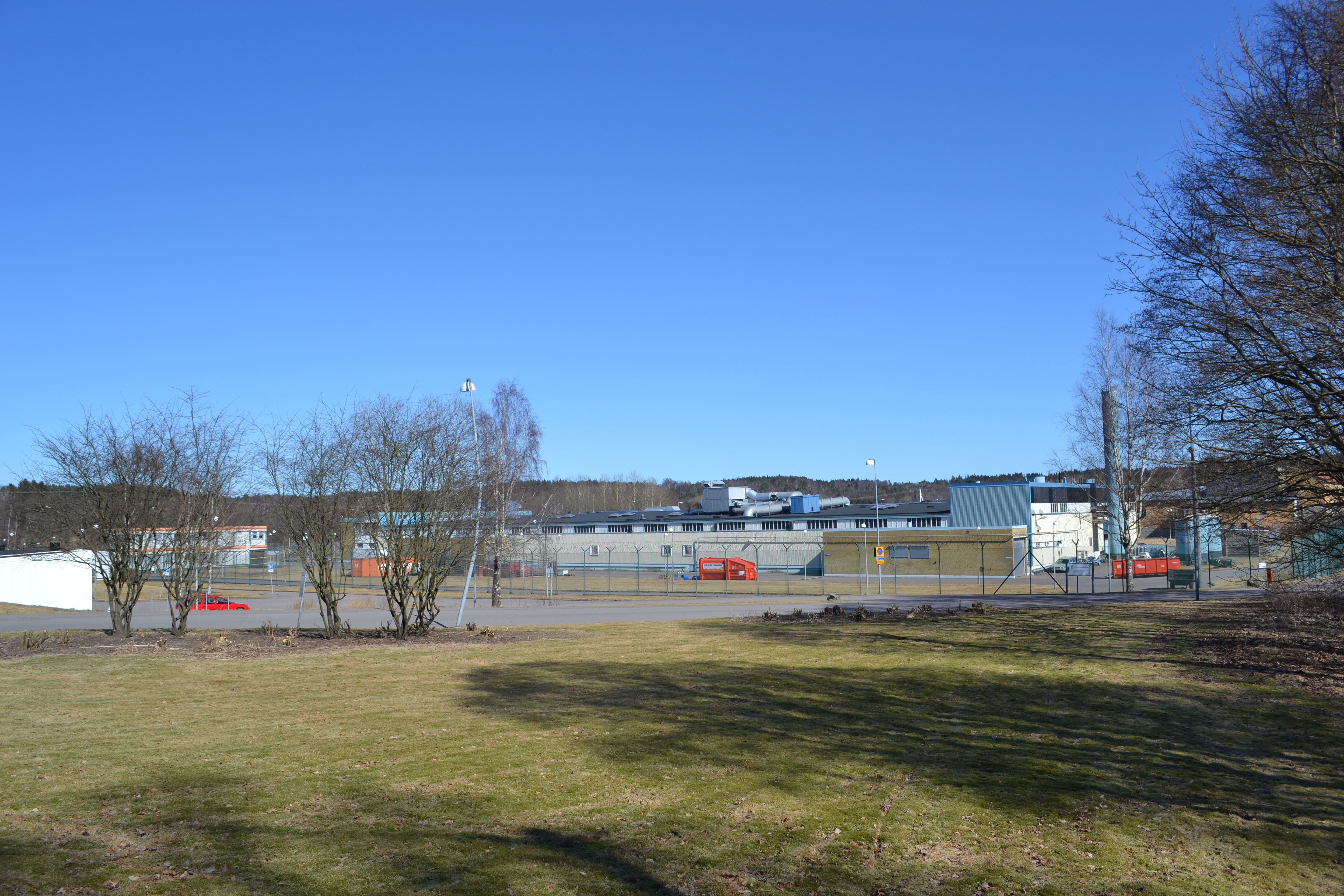 Anstalten Skogome, Göteborg